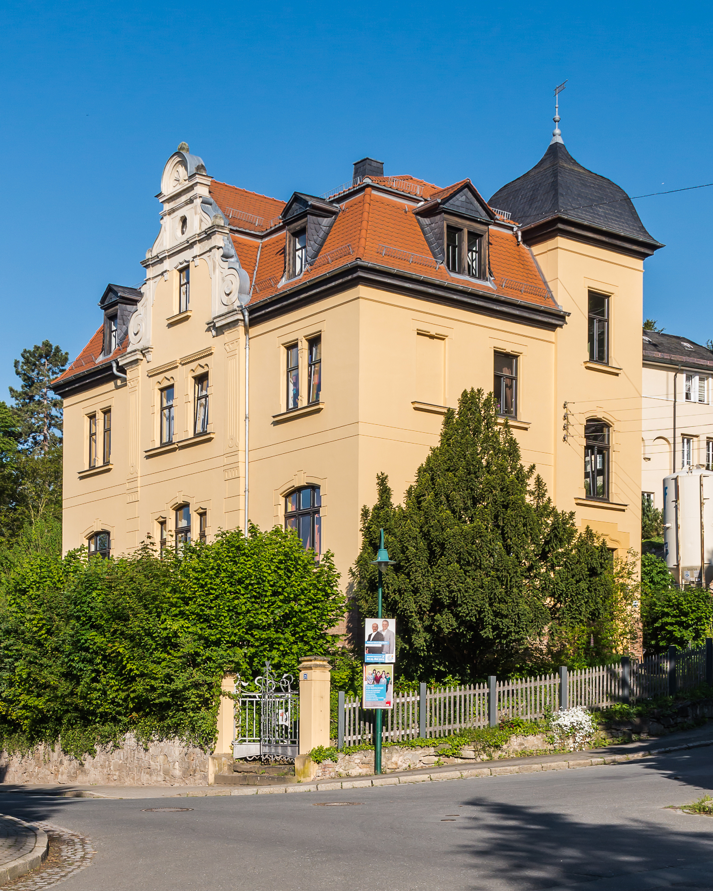 Wohnhaus Schloßstraße 25 in Rudolstadt, Thüringen; erbaut 1902 von den Architekten Carl Mächtig und Rudolf Mächtig für Major Hanns-Günther von Necker; 1945 kurzzeitig Sitz der US-Kommandantur; unter Denkmalschutz